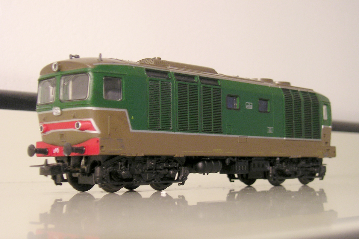 Modello Lima della locomotiva FS D.445